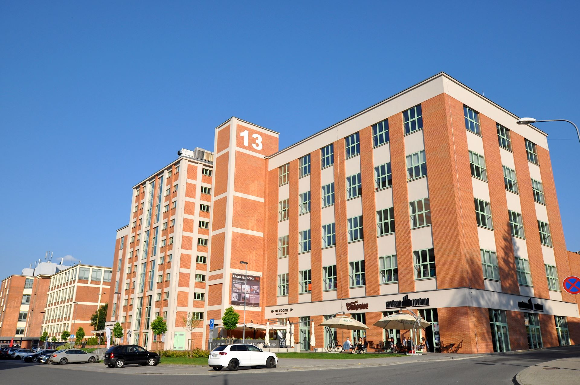 Zlín, Svit, budova 13, Vavrečkova 7074.